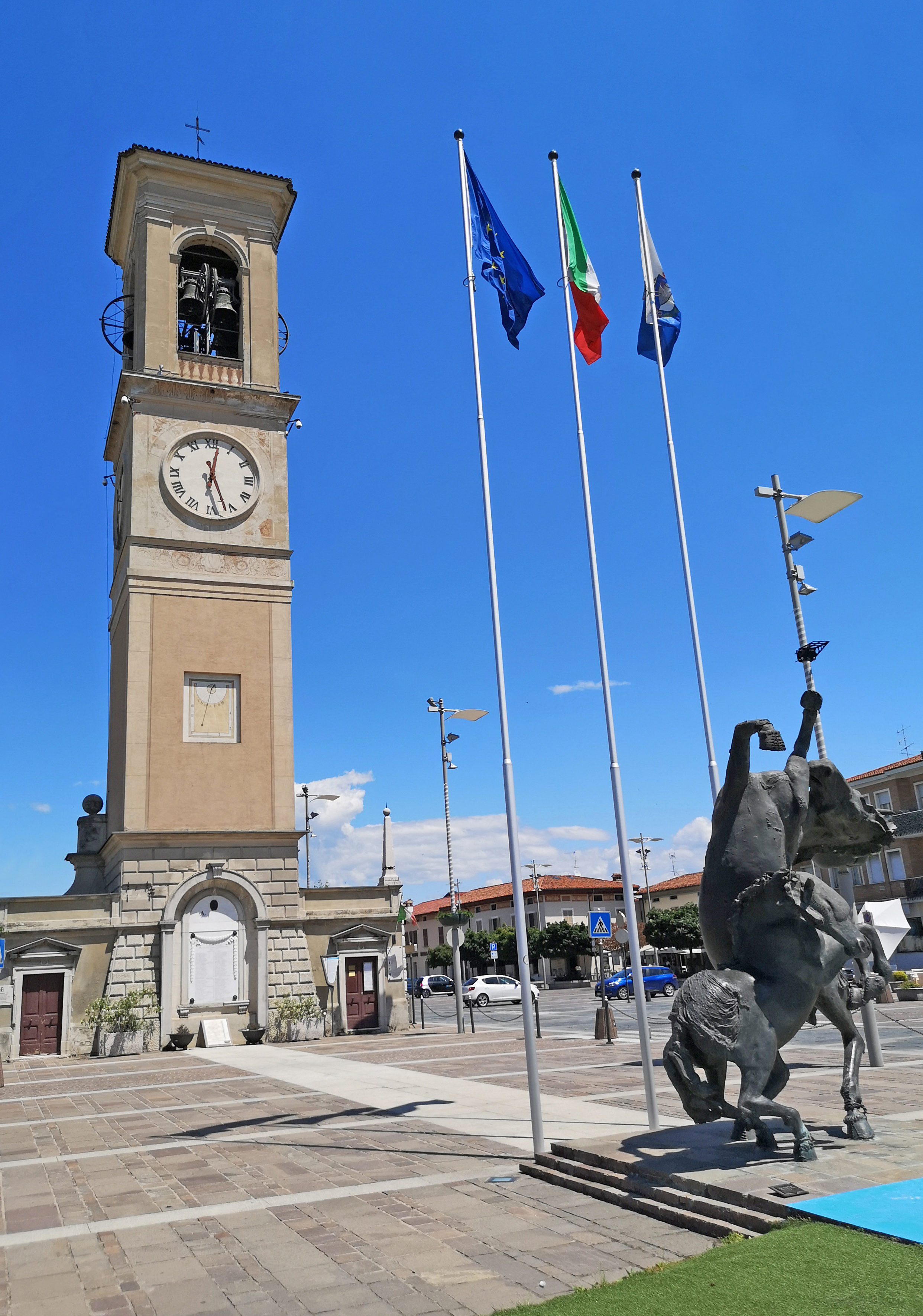 Torre Campanaria di Travagliato